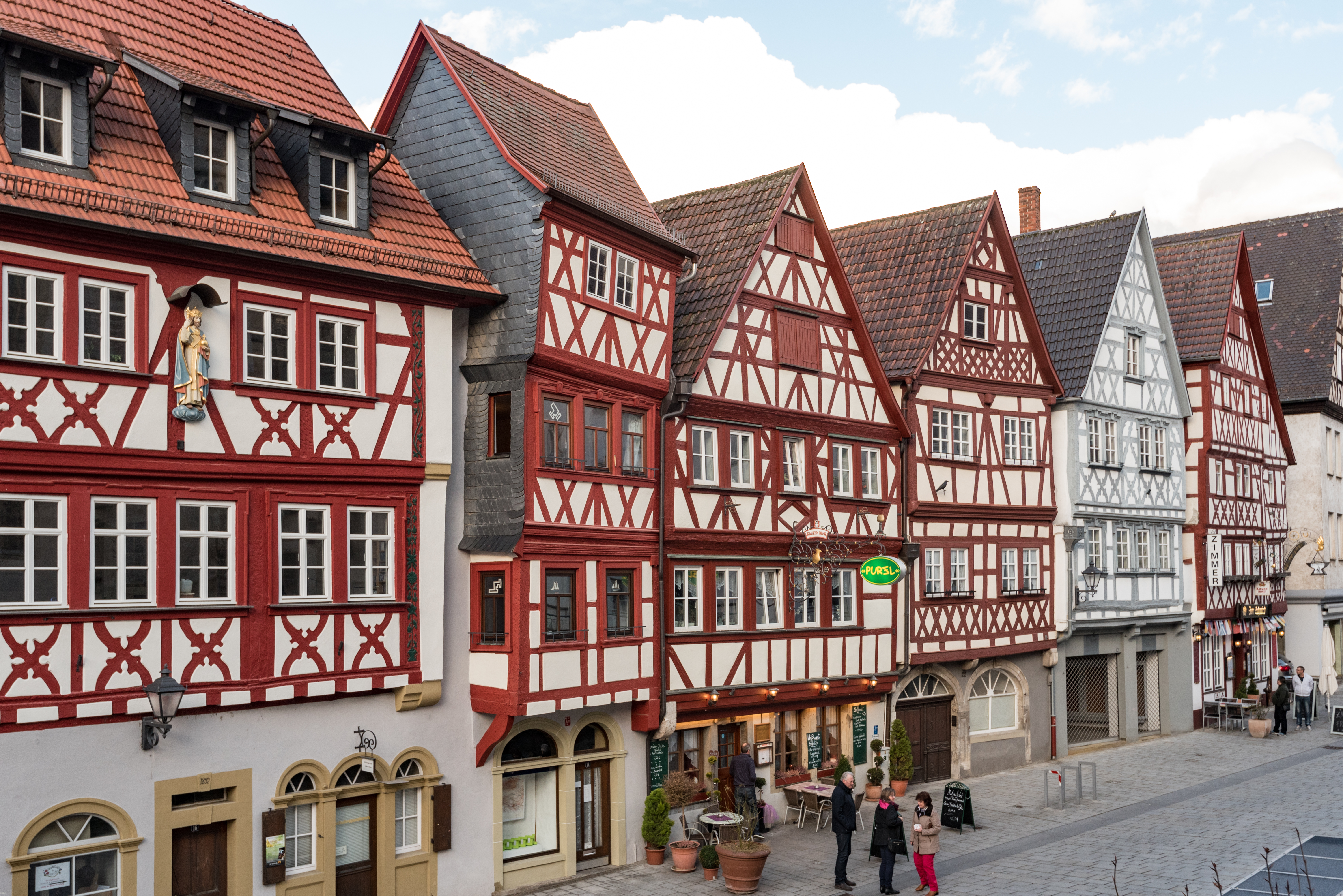 Ochsenfurt, Hauptstraße 18, 20, 22, 24, 26